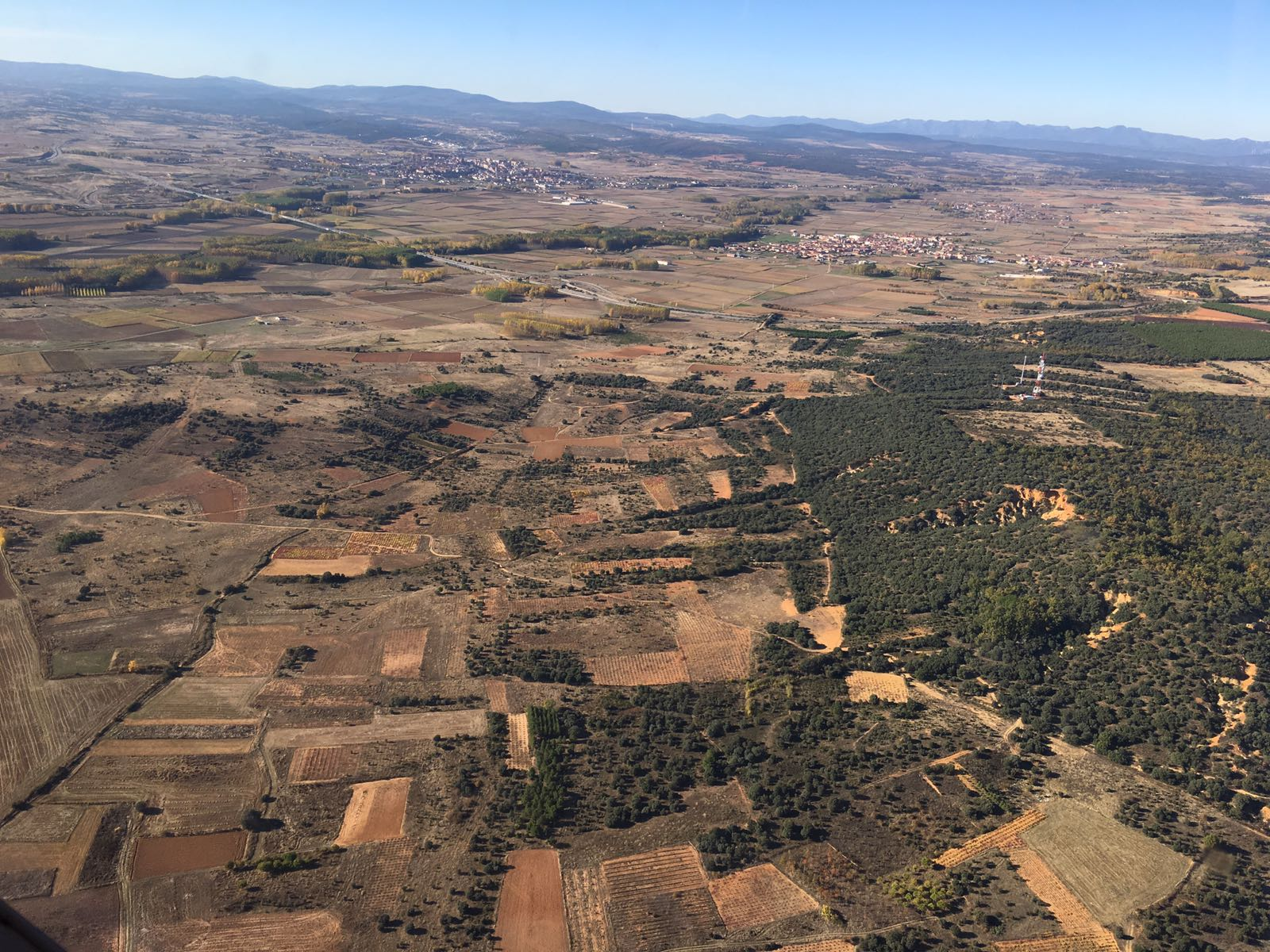 Vista aérea de San Justo de la Vega (León, España). Al fondo, la ciudad de Astorga.